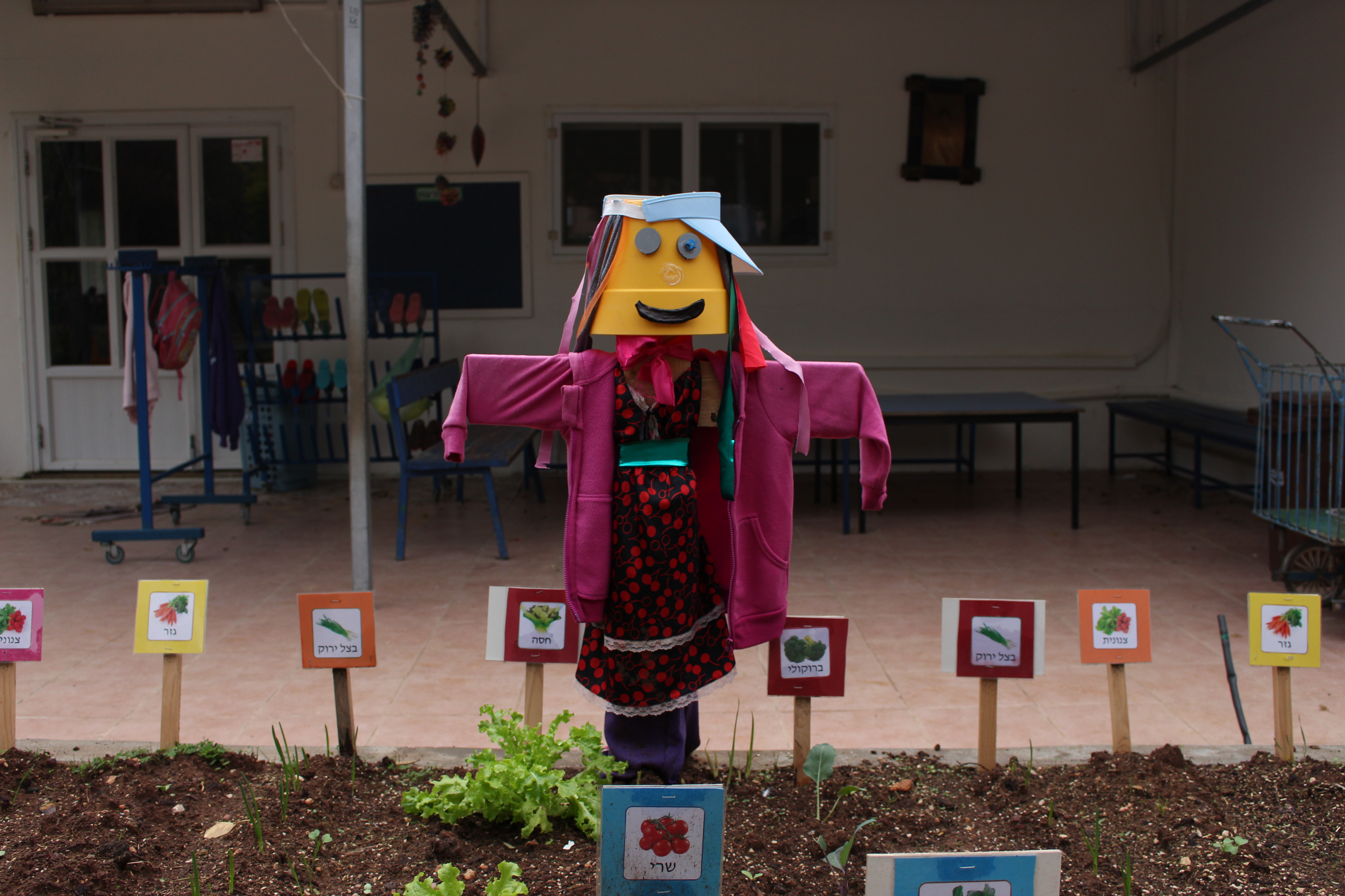 דחליל בגינת צמחים